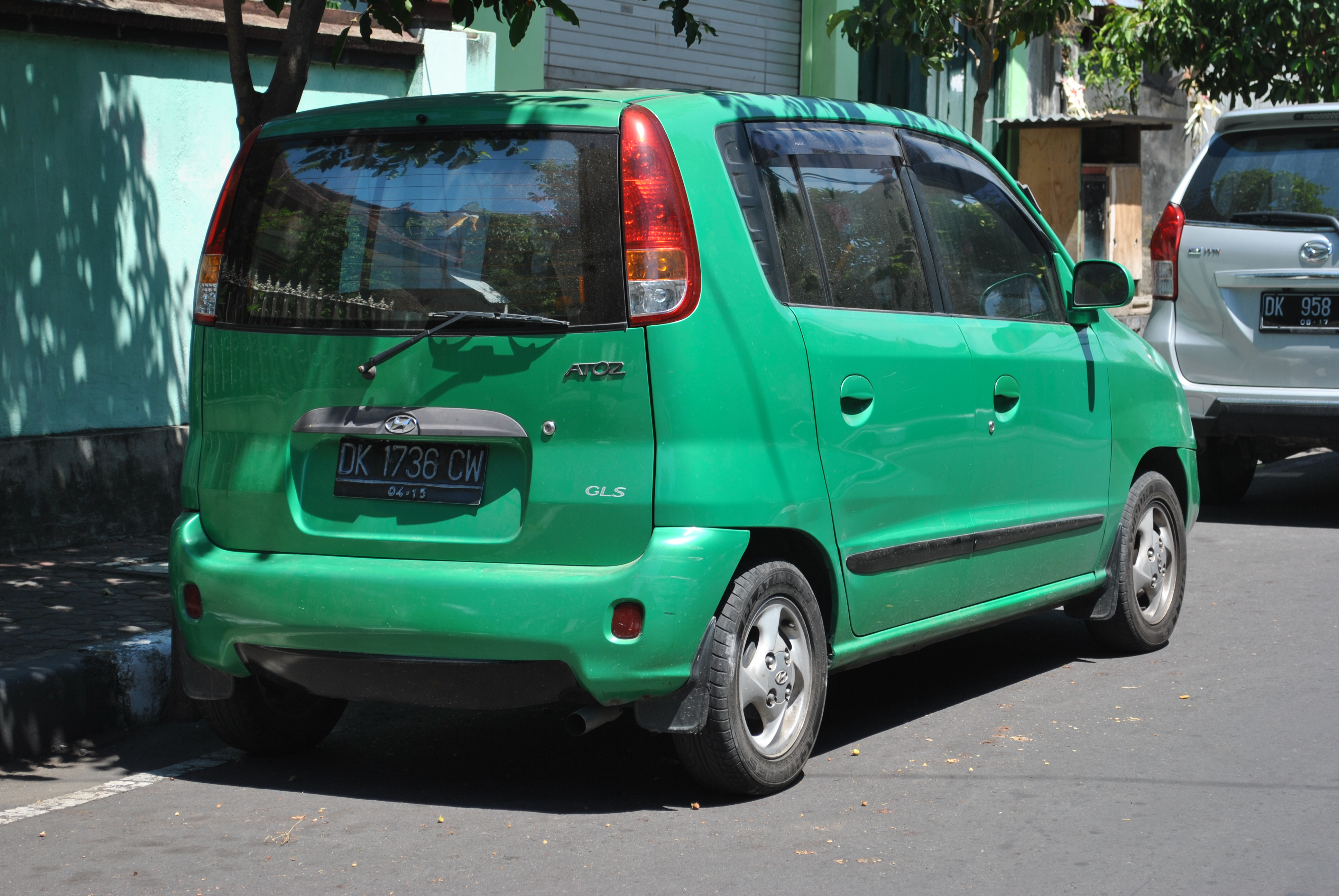 Judul menjelaskan segalanya. Di Indonesia, Hyundai Atos dijual sebagai Atoz (alias huruf s di logo Atos dibalik)